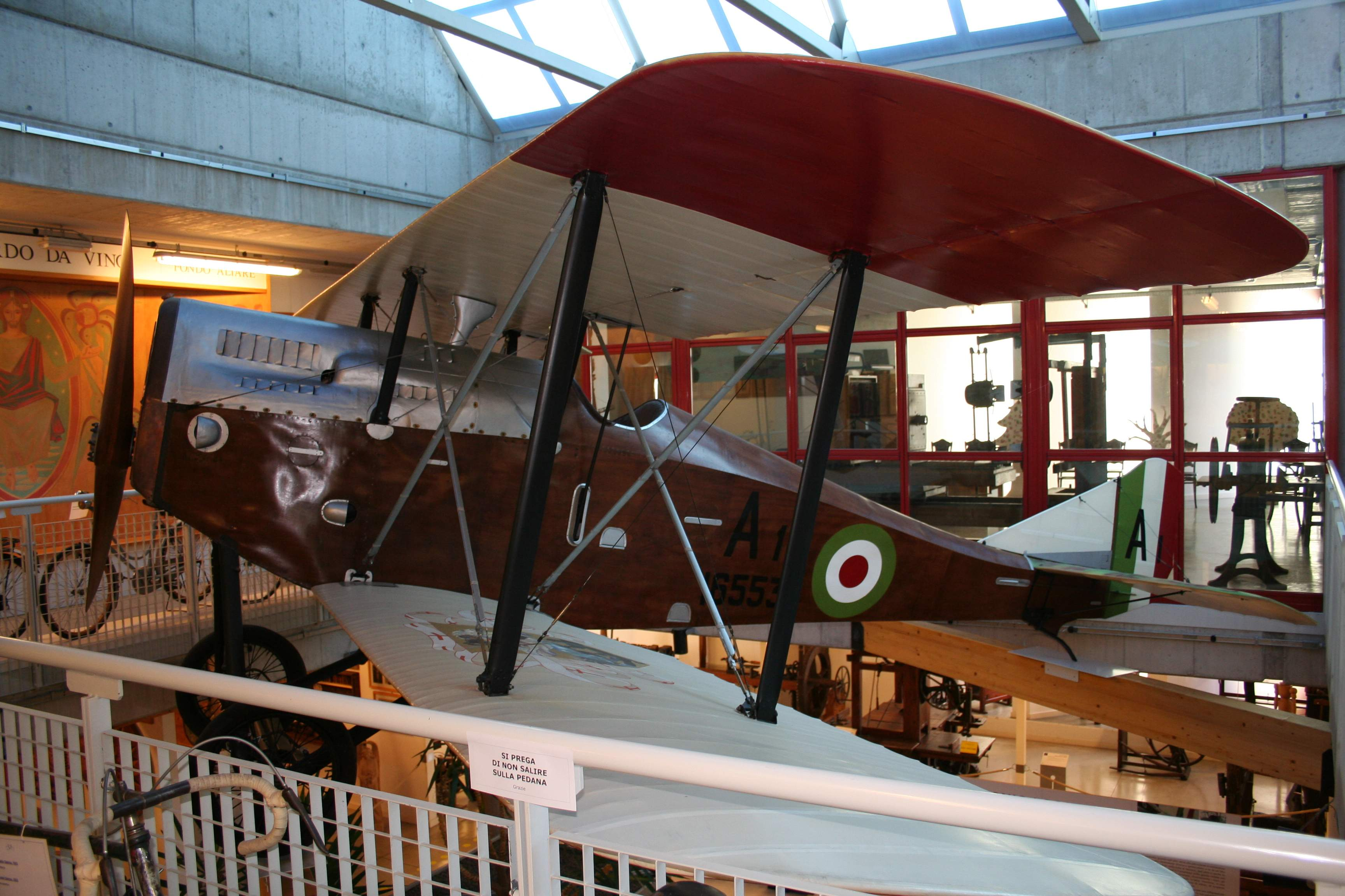 Aereo Ansaldo A1 Balilla di Antonio Locatelli, nell'ex Museo Storico di Bergamo.